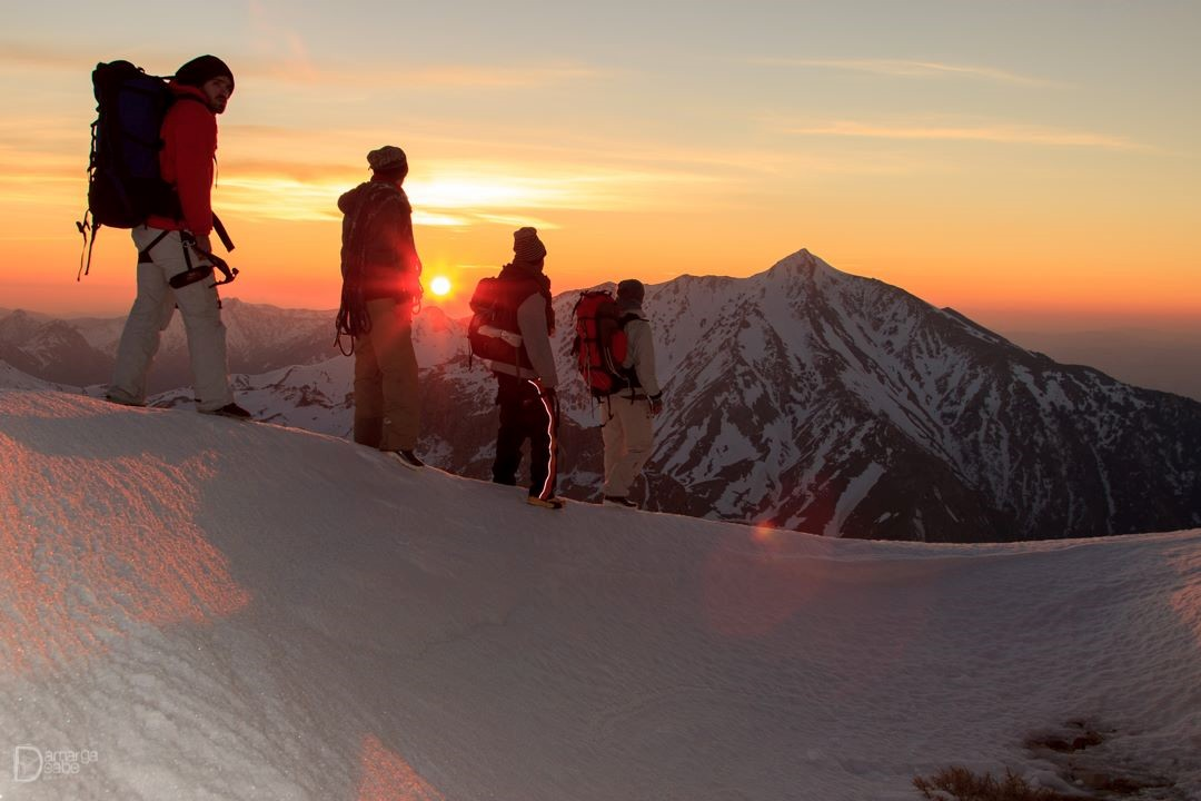 Vue sur Lalla Khadidja, le point culminant du massif du Djurdjura